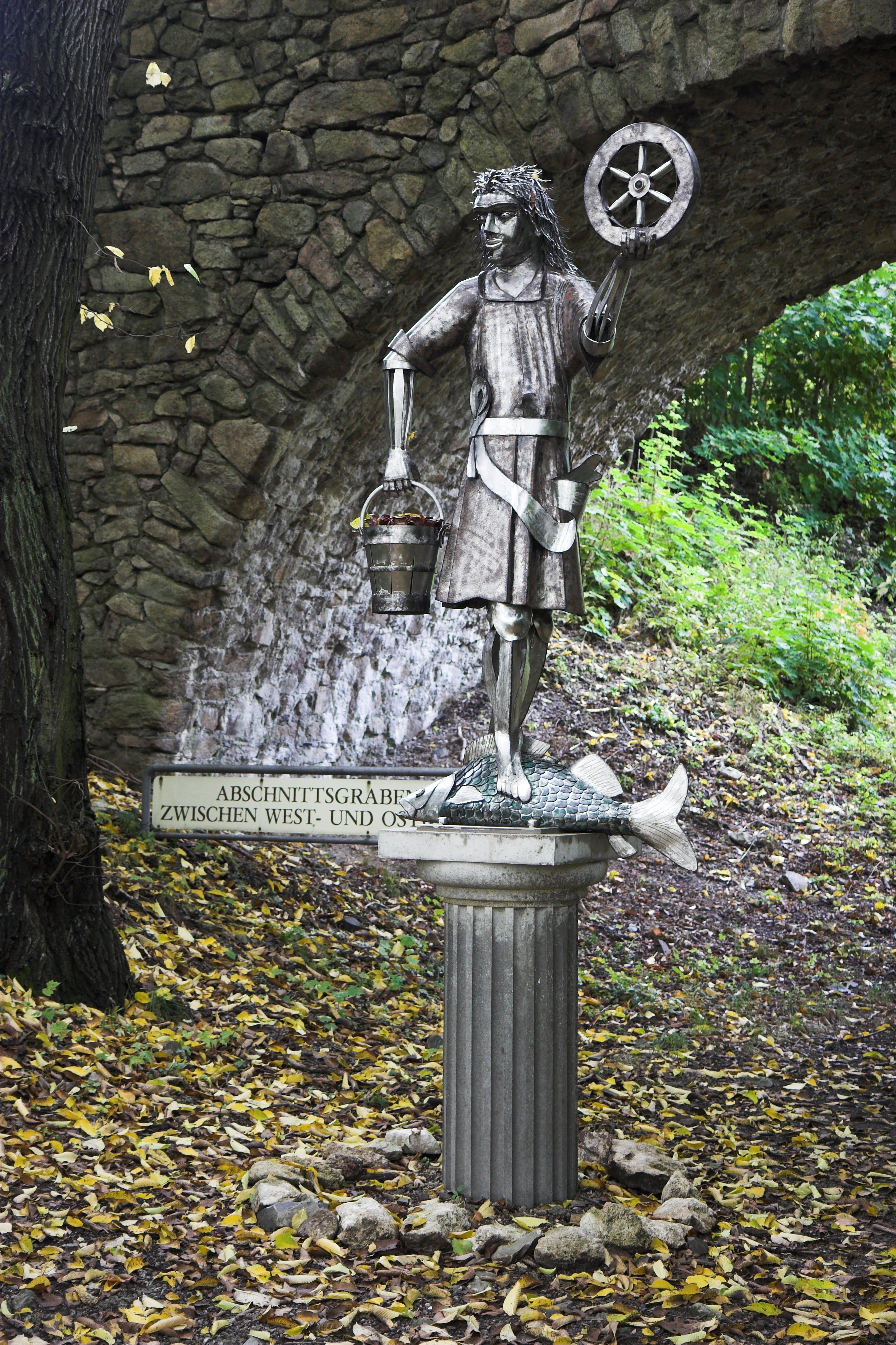 Krodo-Statue auf dem Großen Burgberg bei Bad Harzburg